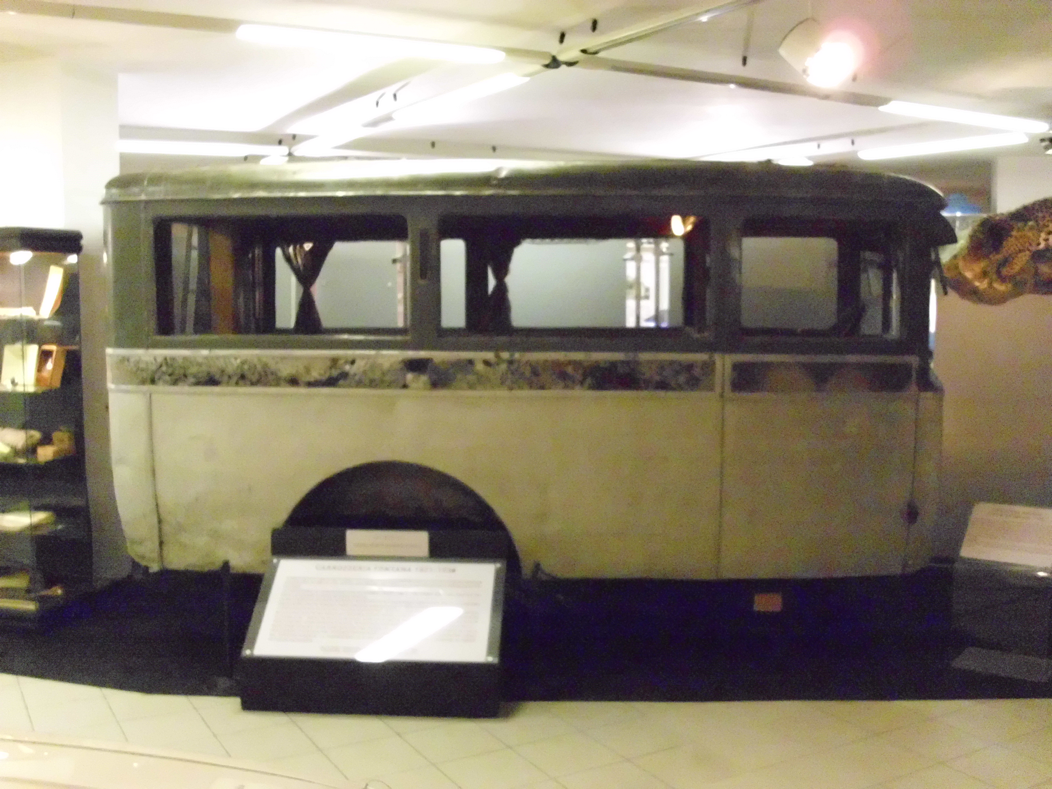 Kleinbus-Karosserie von der Carrozzeria Baldassarre Fontana